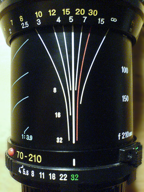 Einstellung der hyperfokalen Entfernung auf einem Zoom-Objektiv